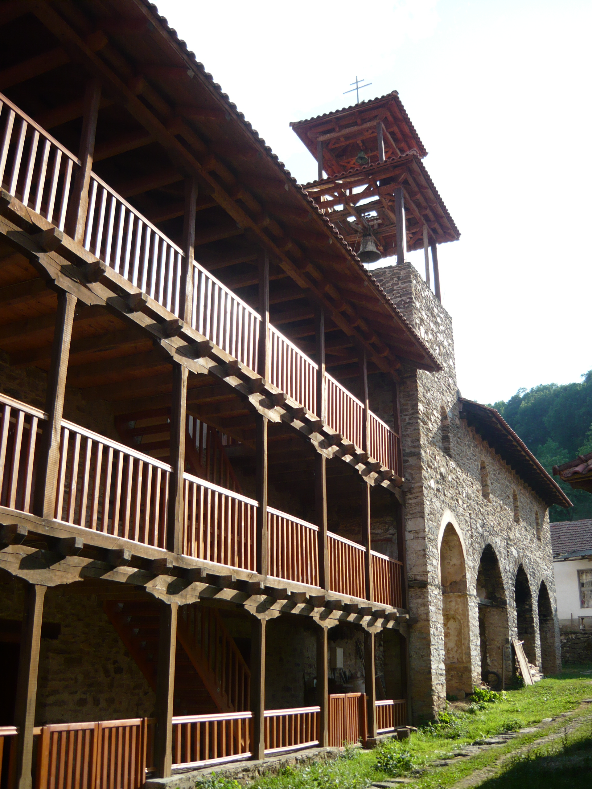 Дел од конаците и маѓерницата во Манастирот Св. Јован Претеча, Слепче.